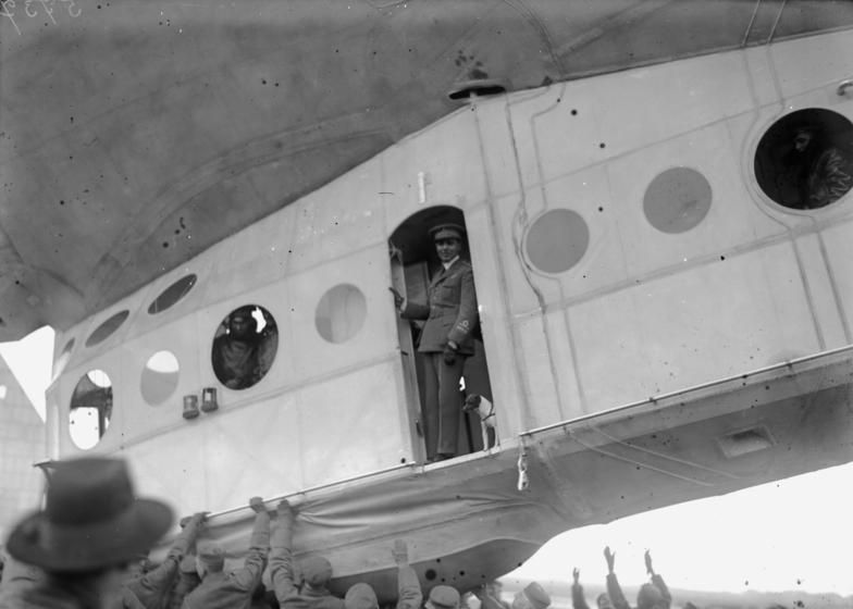 Die glückliche Landung des Nordpol-Luftschiffes "Italia" in Stolp in Pommern! Nach 30 stündigem Fluge landete das italienische Nordpolluftschiff "Italia" unter Führung des Generals Nobile wohlbehalten in Stolp in Pommern. Eine Stabiliesierungsfläche am Luftschiff wurde im Gewittersturm stark beschädigt. General Nobile der Führer des Luftschiffes "Italia" in der Kabine kurz vor der Landung.